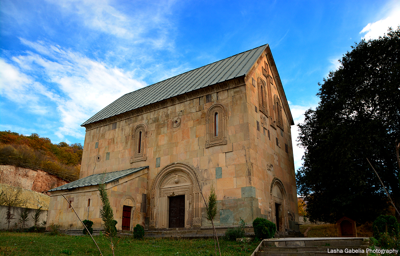 დაბა კაზრეთის სამების ეკლესია სატრაპეზო და სხვა ნაგებობანი